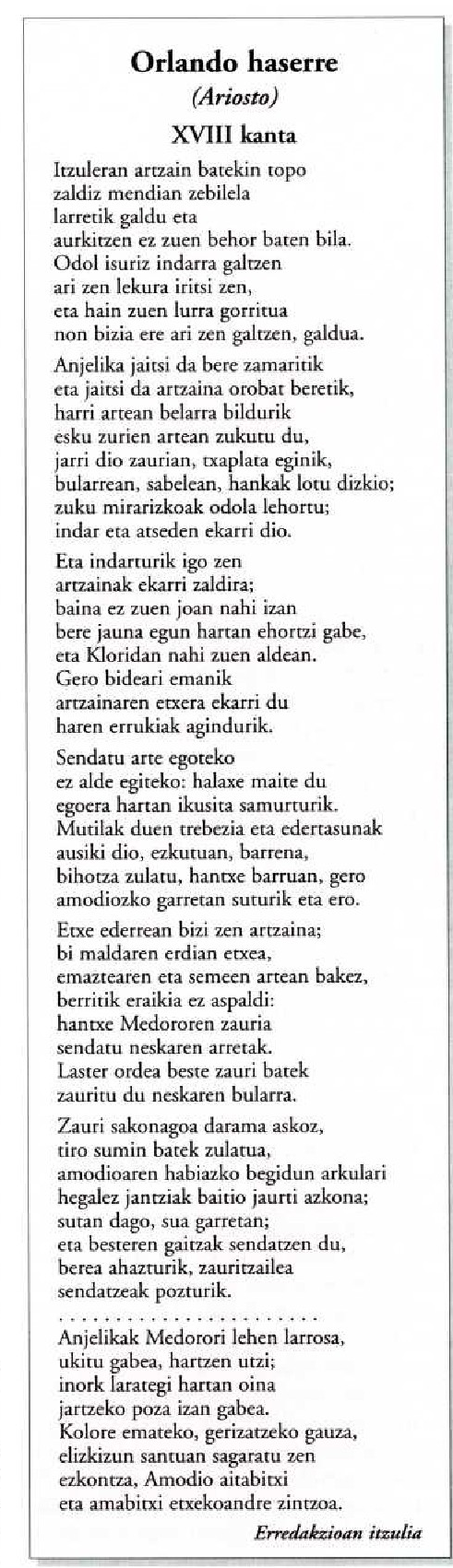 Orlando haserre olerkia izan zen Ludovico Ariostoren lan nagusia; hona hemen pasarte bat.